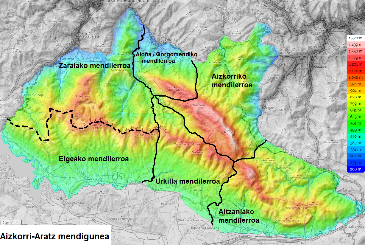 Aizkorriko mendigunean kokatuta dauden Aloña, Aizkorri, Altzania, Urkilla, Elgea eta Zaraiako mendilerroak dira